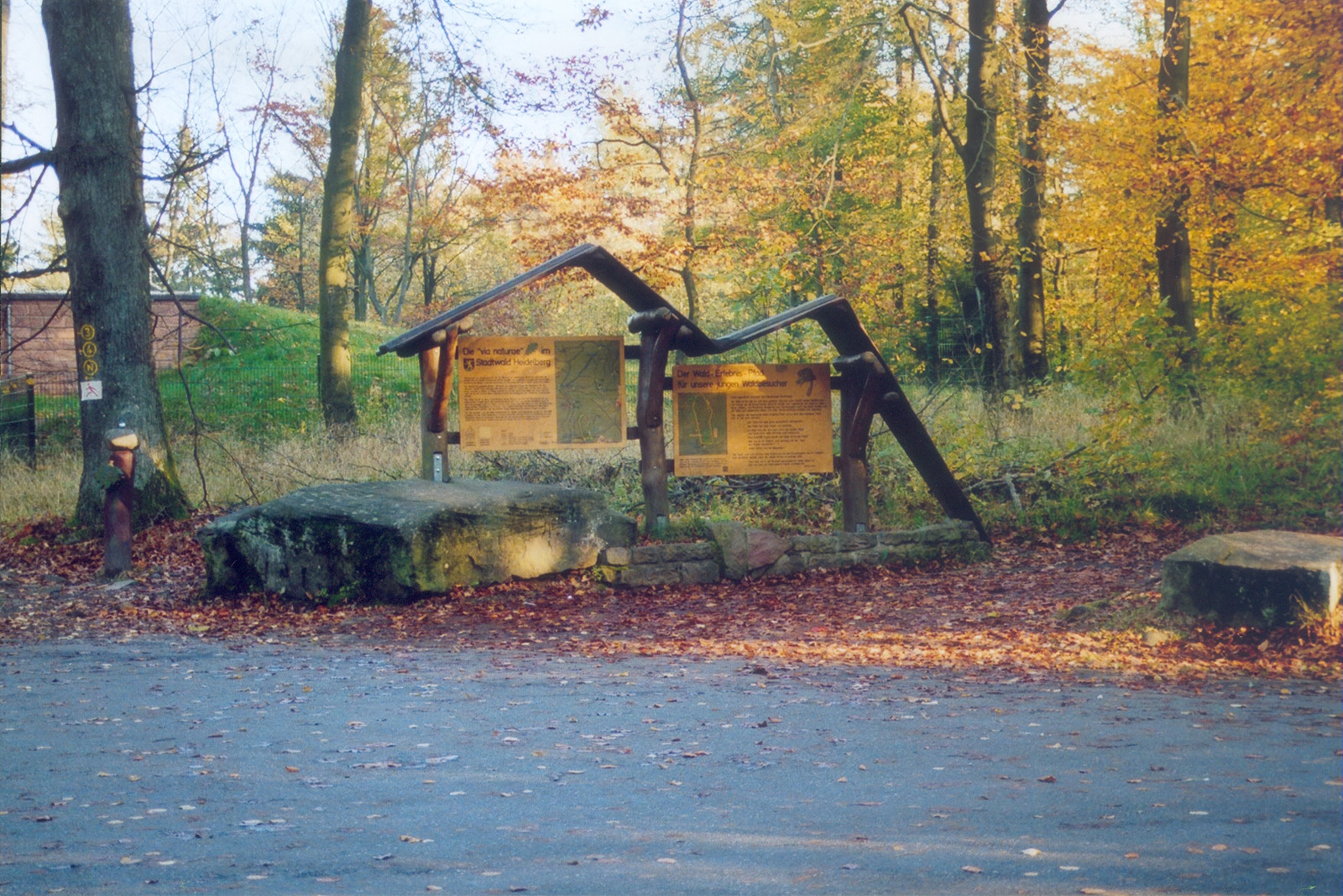 Der Königstuhl-Gipfel mit den Infotafeln